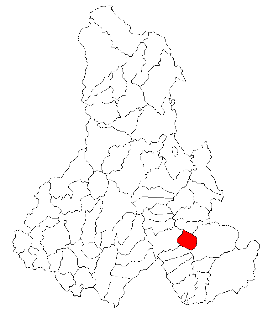 Categorie:Hărţi ale judeţului Harghita Contents 1 Licensing 2 Sursă 3 Licensing 4 Original upload log Licensing Sursă ro::Imagine:Harta_jud_Harghita.png